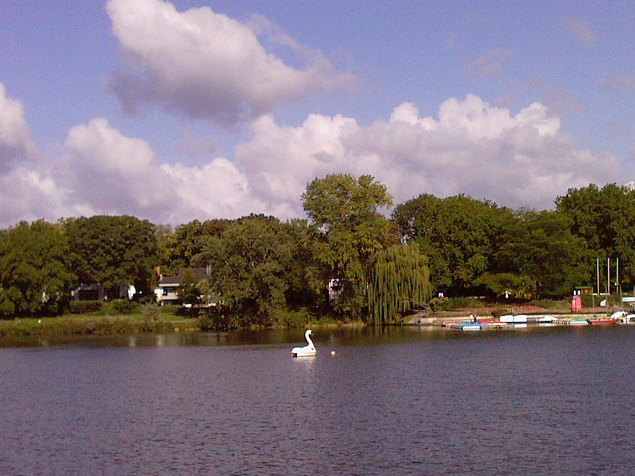 تصنيف:مدن ألمانيا تصنيف:بحيرات تصنيف:جغرافيا ألمانيا